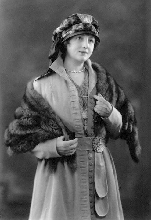 Lilian Braithwaite